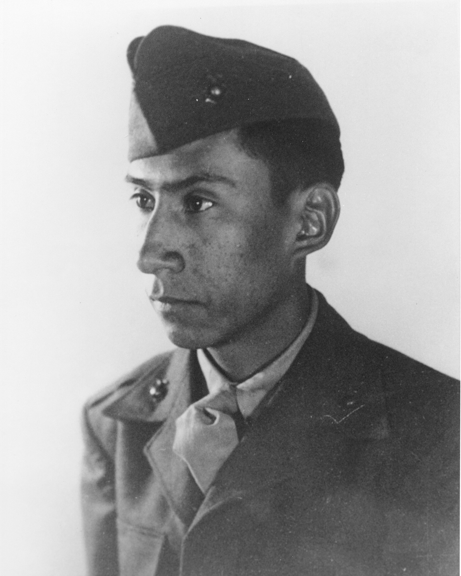 Ambrosio Guillen, USMC, Medal of Honor recipient